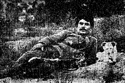 צבי בקר